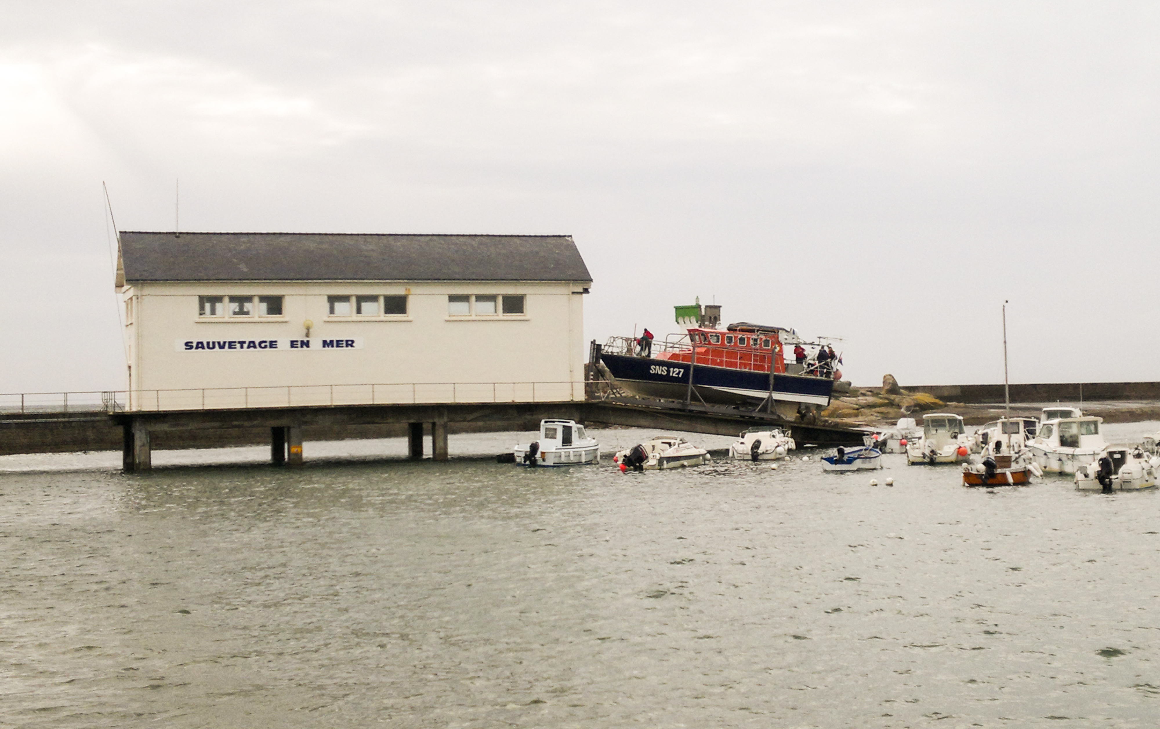 Bâtiment de la Société nationale de sauvetage en mer à Trévignon